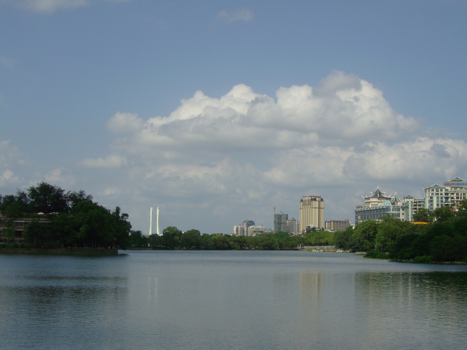 中文（中国大陆）: 惠州西湖